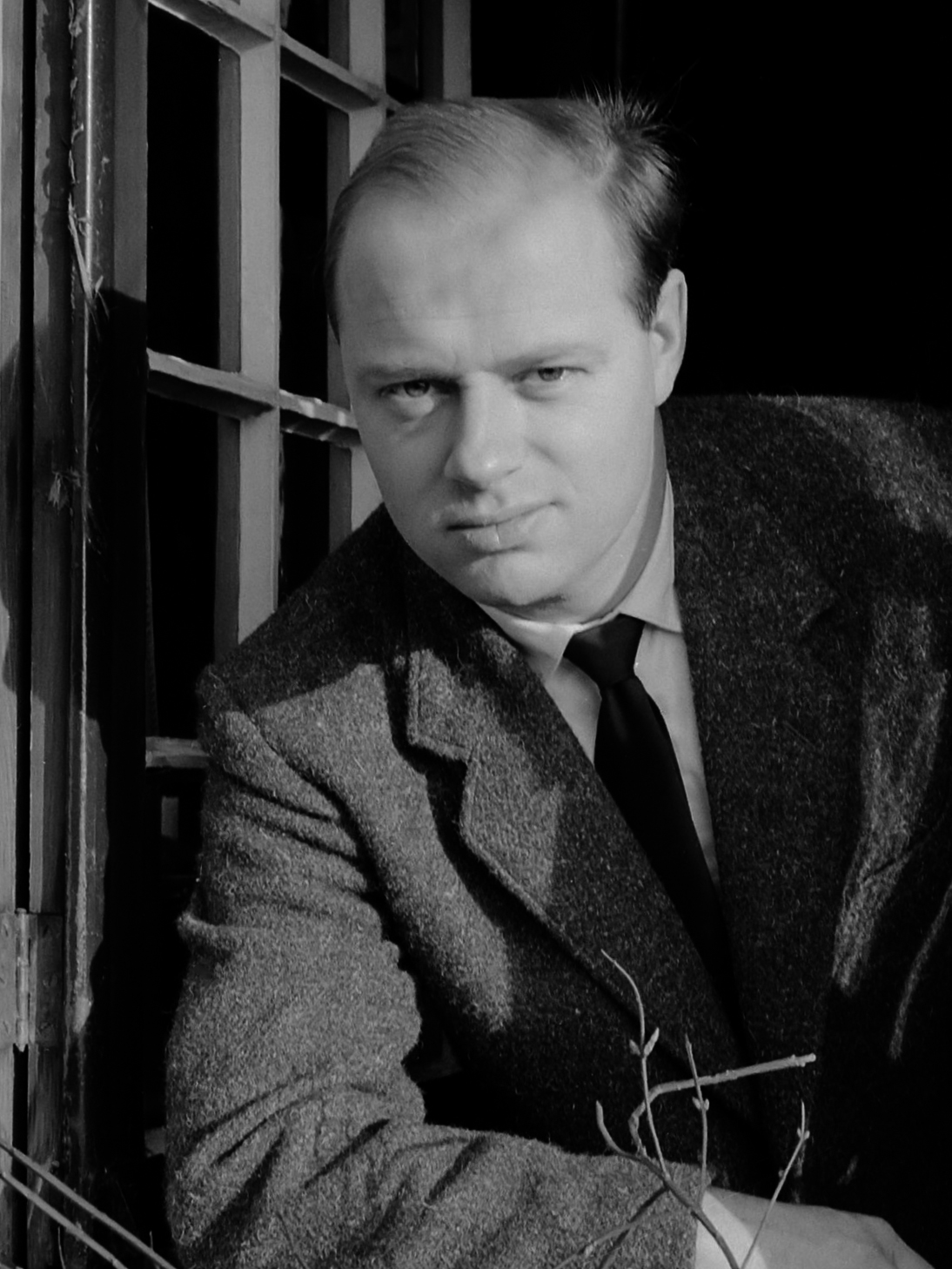 Bernhard Haitink die de functie aangeboden gekregen heeft als directeur van het Minneapolis Symphony Orchestra 30 december 1959